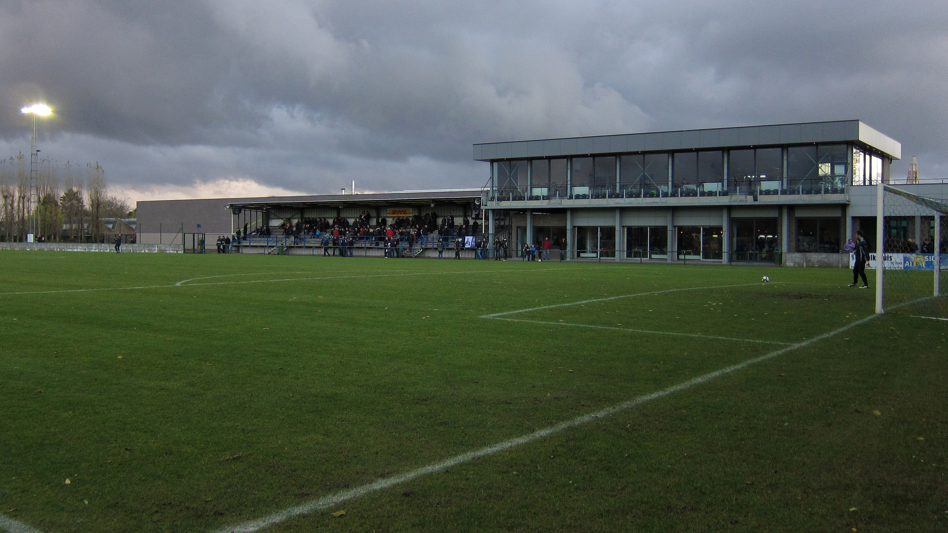 Het stadion van KV Woluwe-Zaventem, België